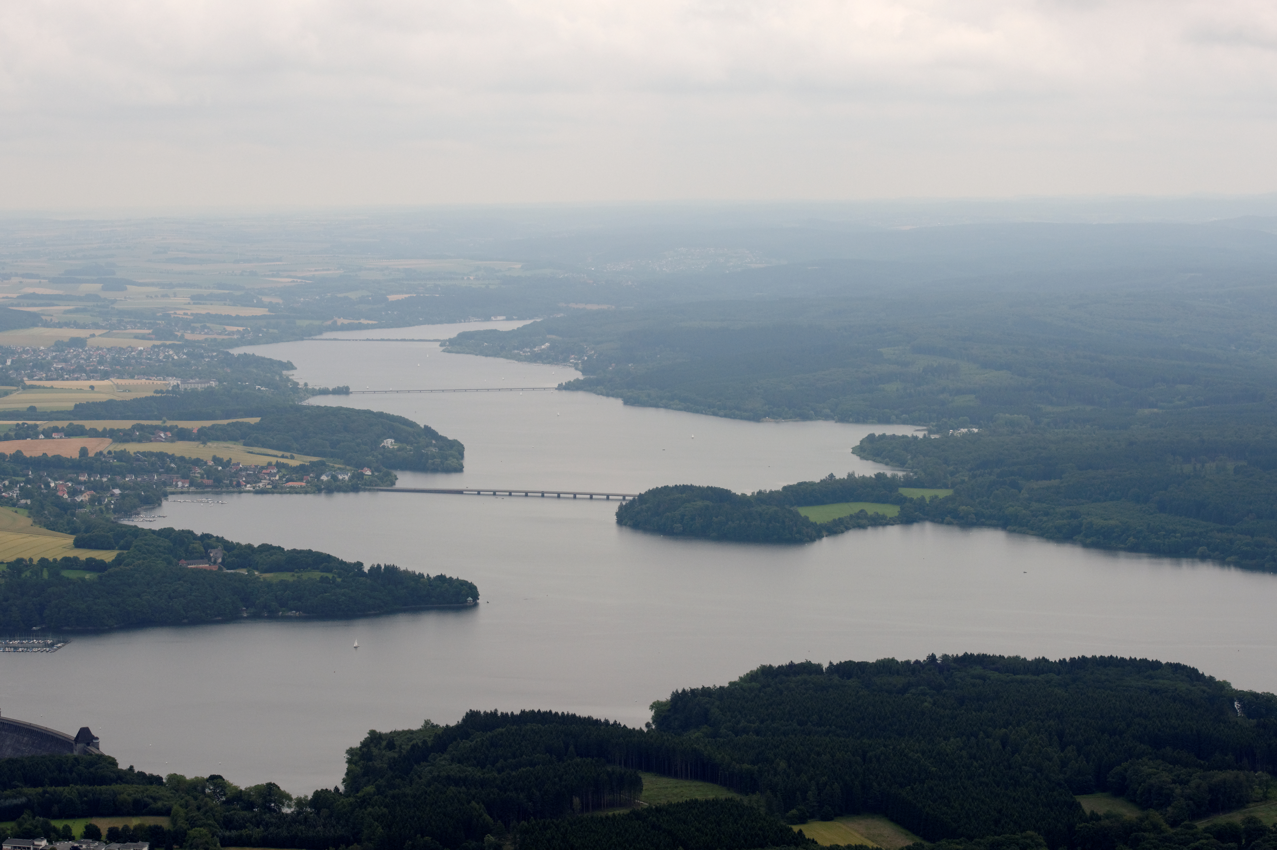 Fotoflug Sauerland-Nord. Möhnesee: Gesamtansicht mit Delecker Brücke, Fußgängerbrücke und Stockumer Damm. The making of this document was supported by the Community-Budget of Wikimedia Germany.